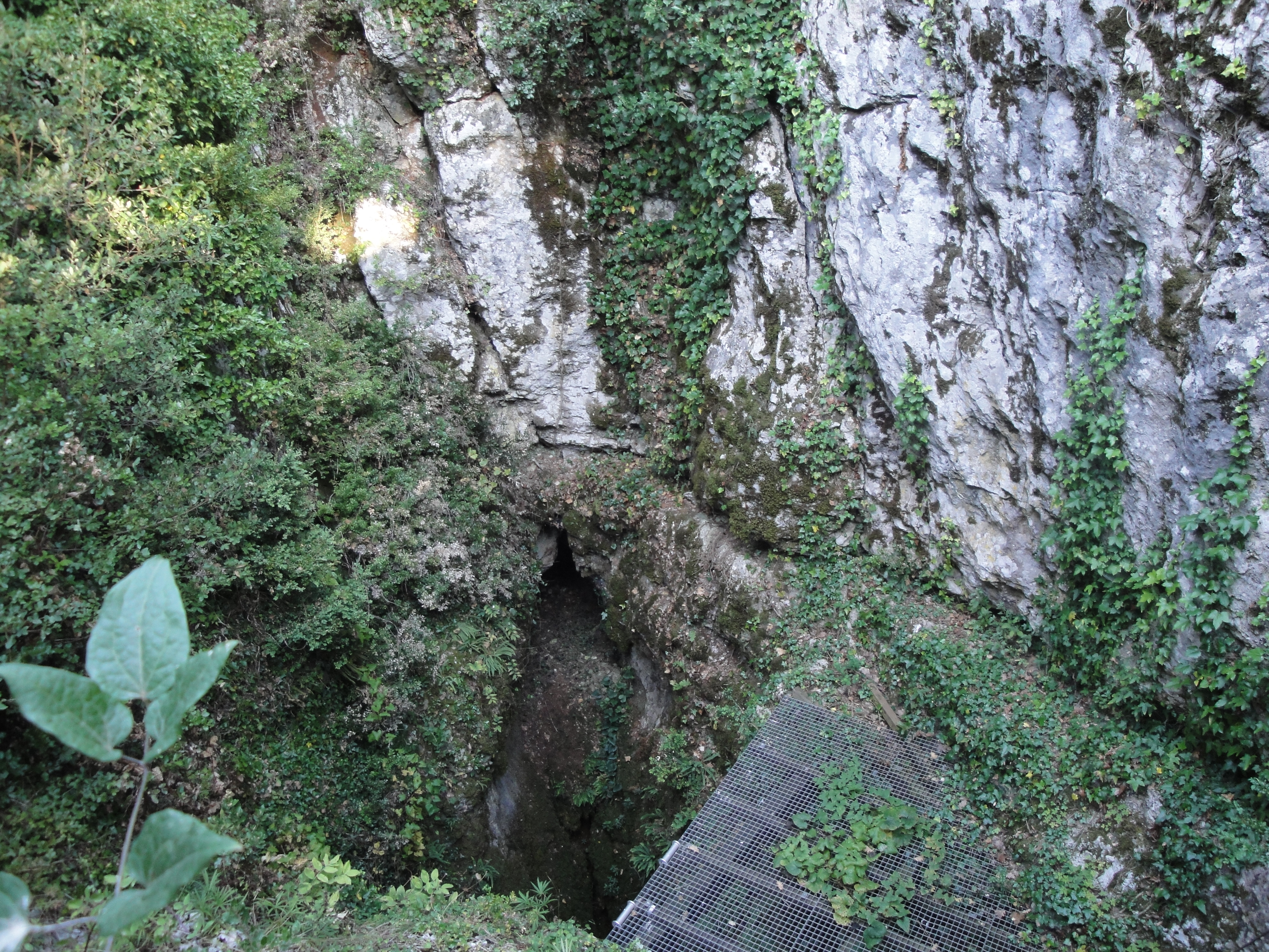 Natürlicher Eingang in die Aven d'Orgnac